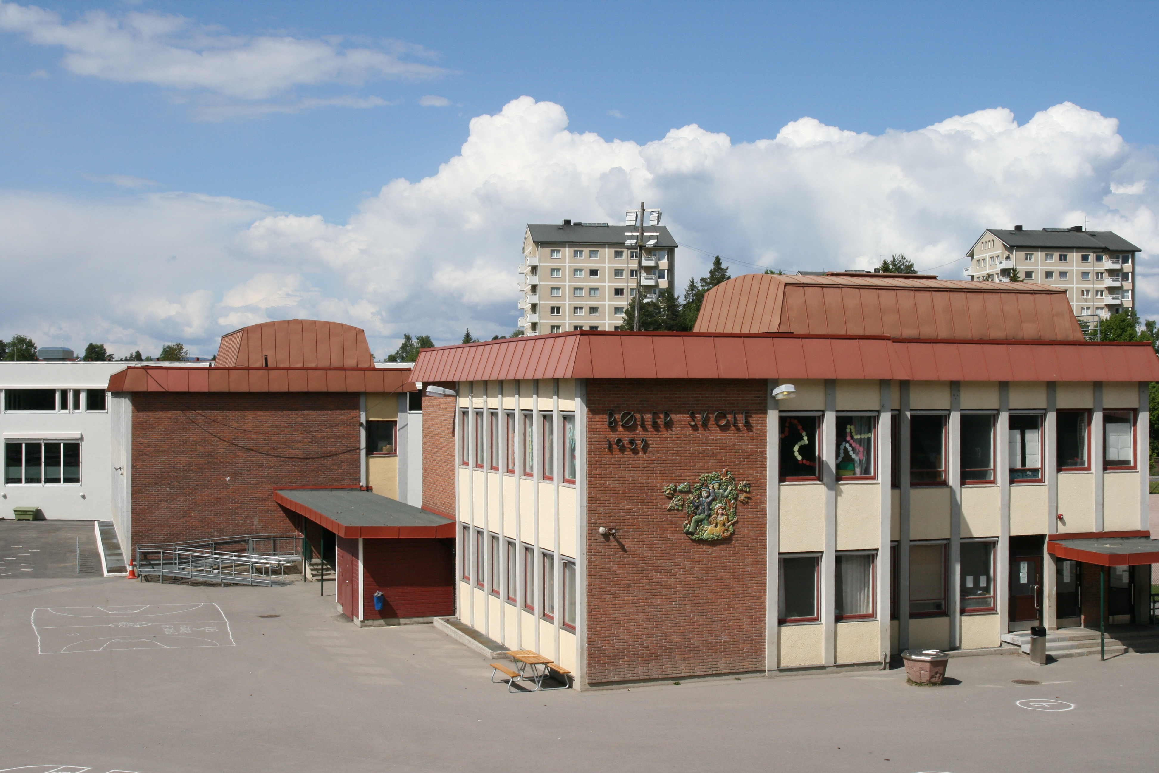 Bøler skole i Oslo